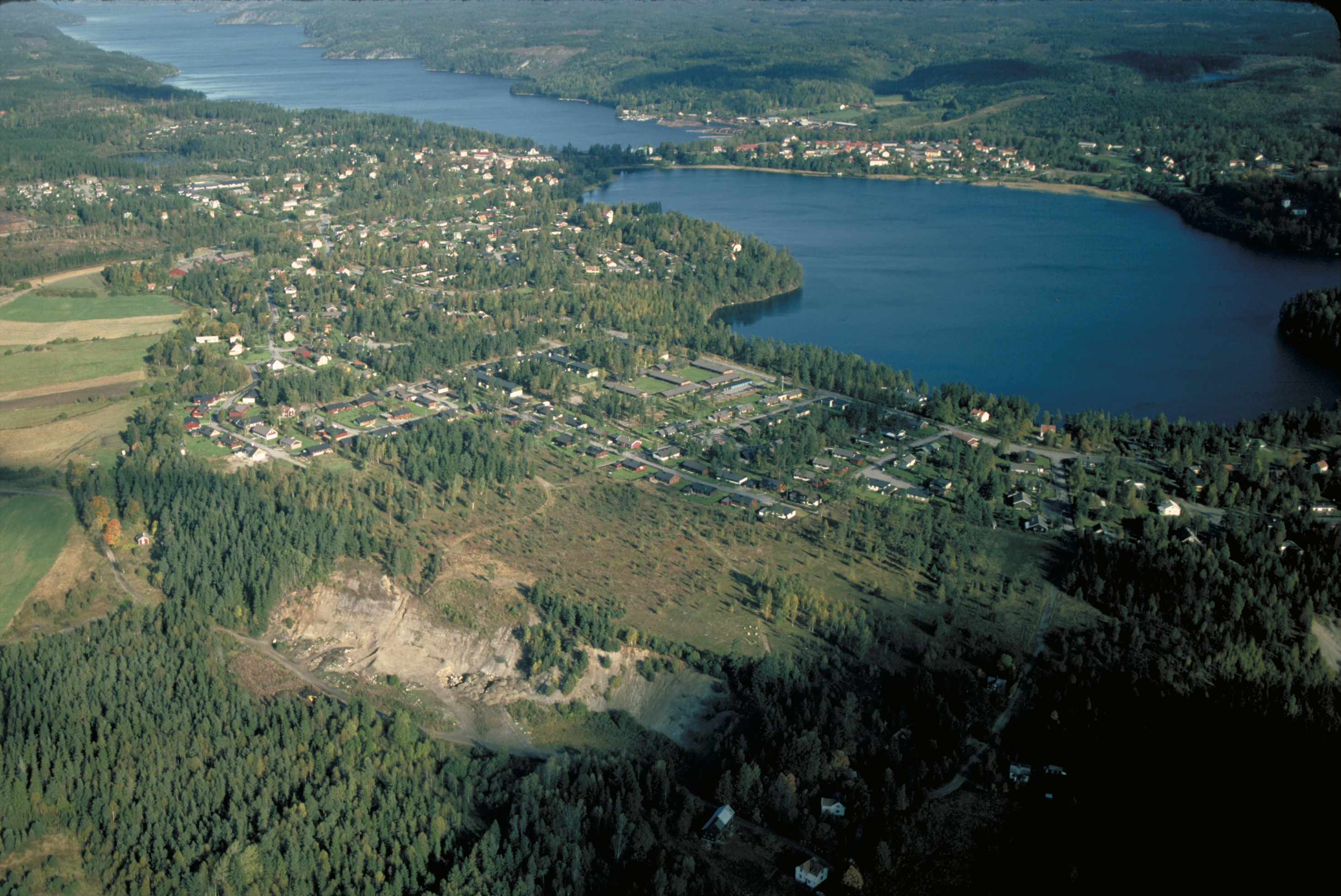 Bilden troligen från omkring 1980. Motiv: Dals-Ed Nyckelord: Flygbilder, Riksintressen Kategori: Insjömiljöer Bilden troligen från omkring 1980.